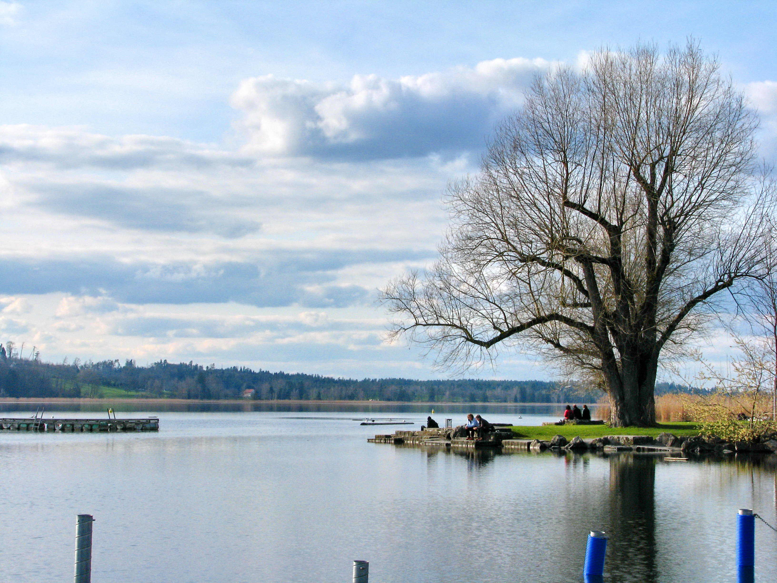 Pfäffikersee (Lake Pfäffikon) at Auslikon Strandbad as seen from Robenhuserriet in Wetzikon (Switzerland)